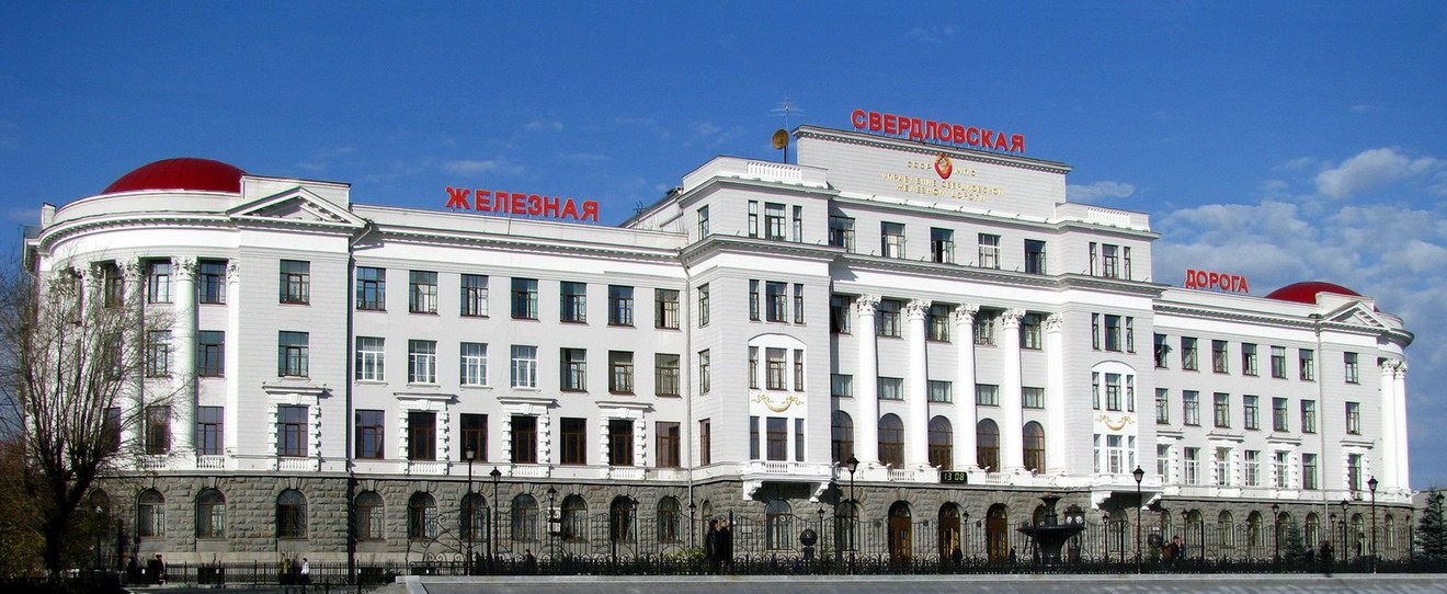 Управление Свердловской железной дороги. Здание управления является памятником архитектуры федерального значения, построено в 1925-1928 гг по проекту известного екатеринбургского архитектора К.Т.Бабыкина.